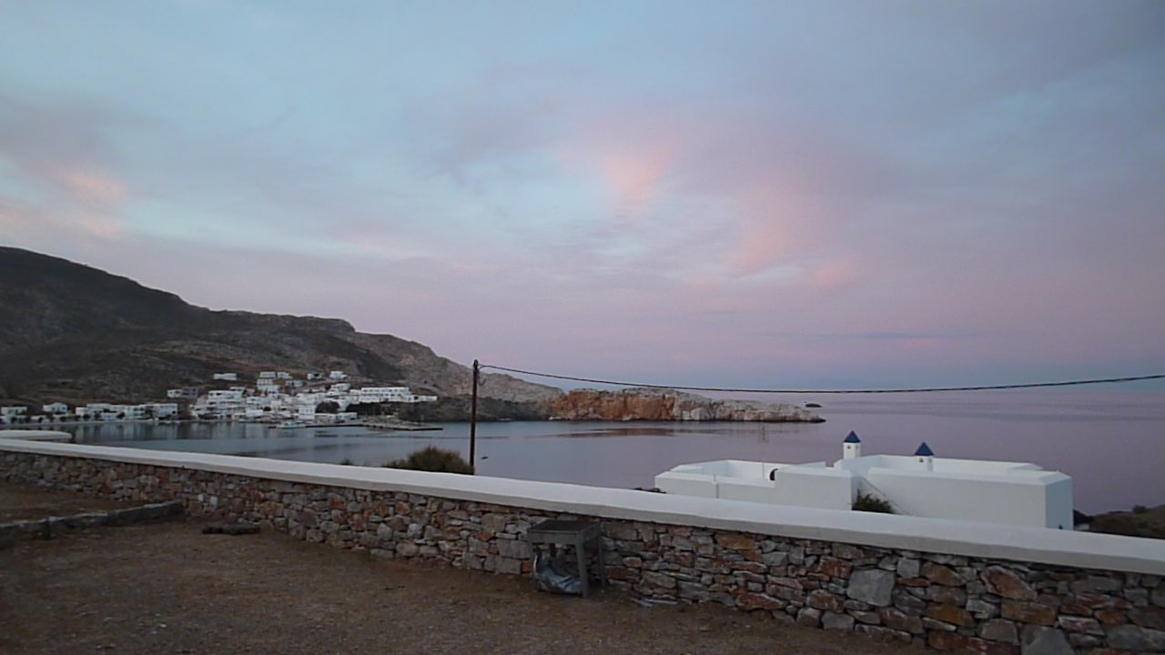 Καραβοστάσης Φολεγάνδρου